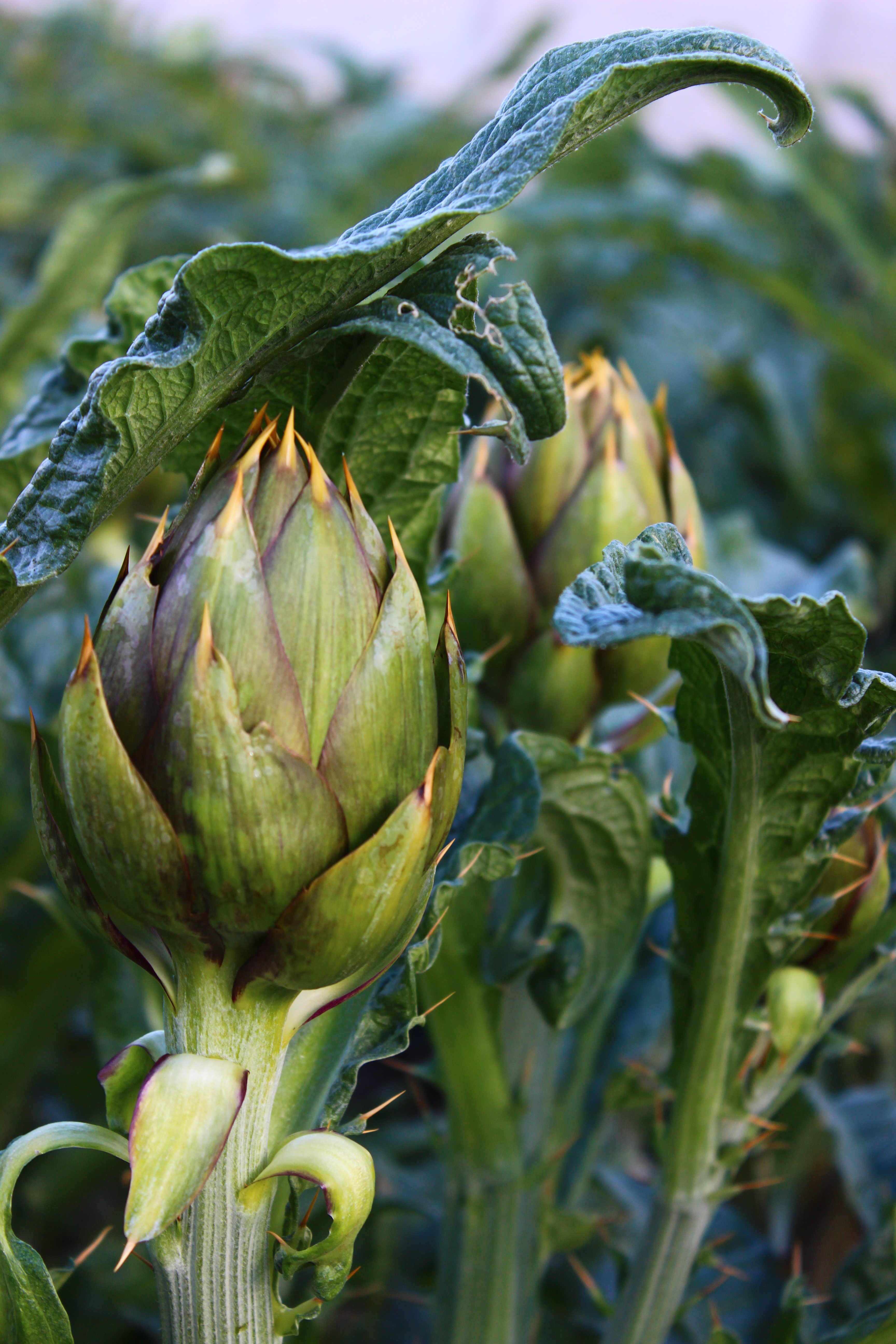 Campo di carciofi spinosi pronti alla raccolta, a Lusignano